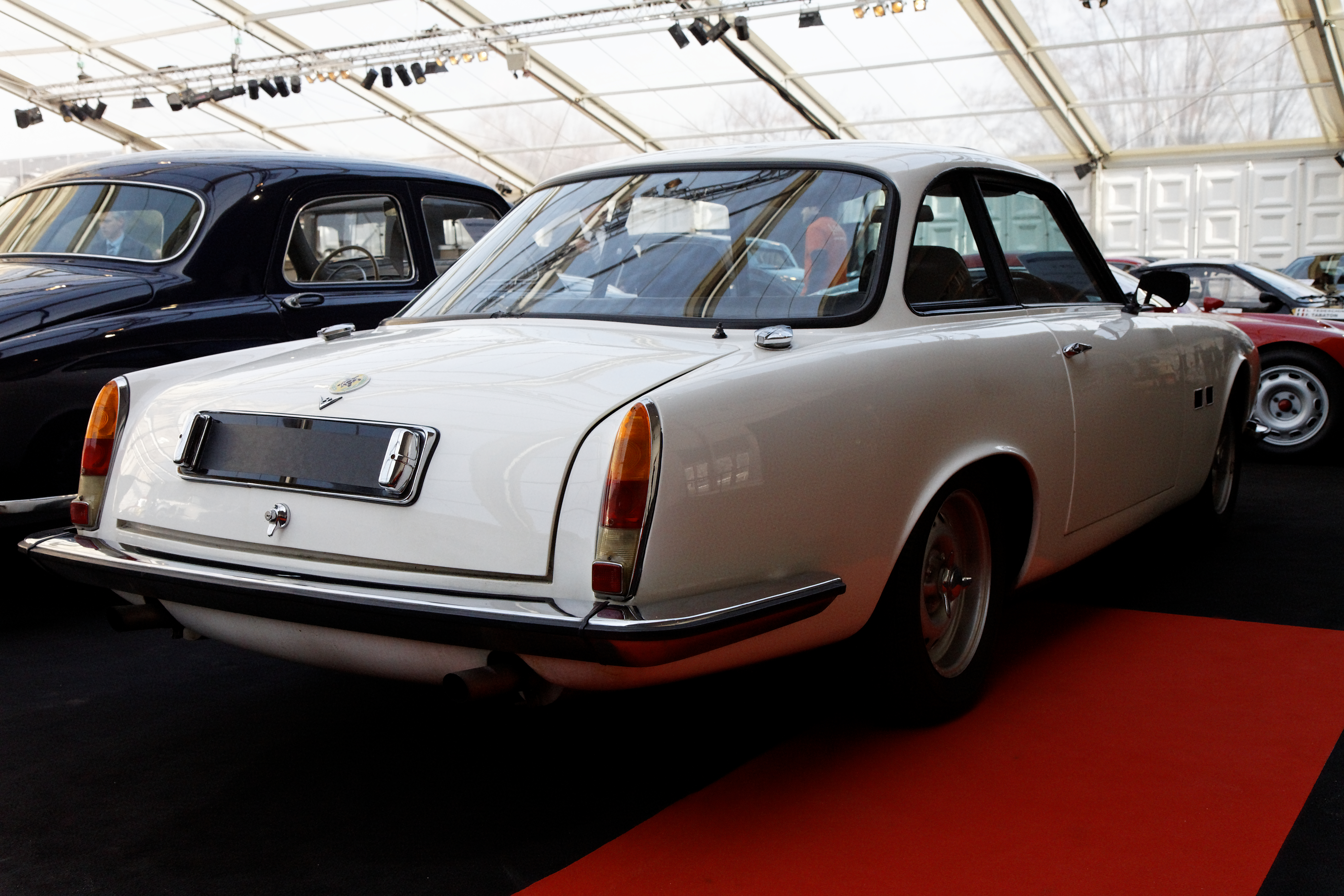 Gordon-Keeble Coupé Bertone - Festival Automobile International 2011 - Vente aux enchères